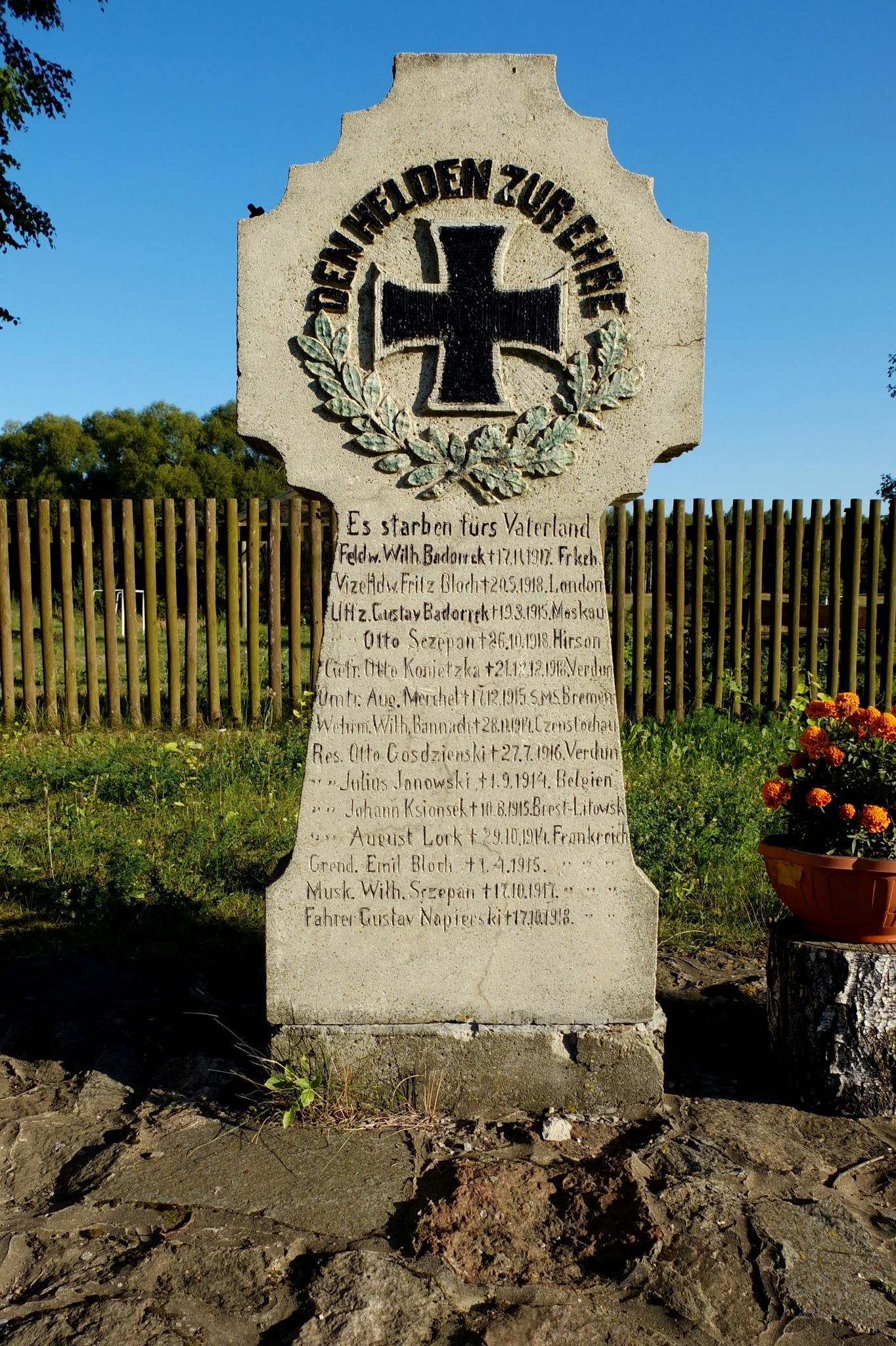 Witówko - pomnik upamiętniajacy poleglych w trakcie I wojny światowej mieszkańców wsi